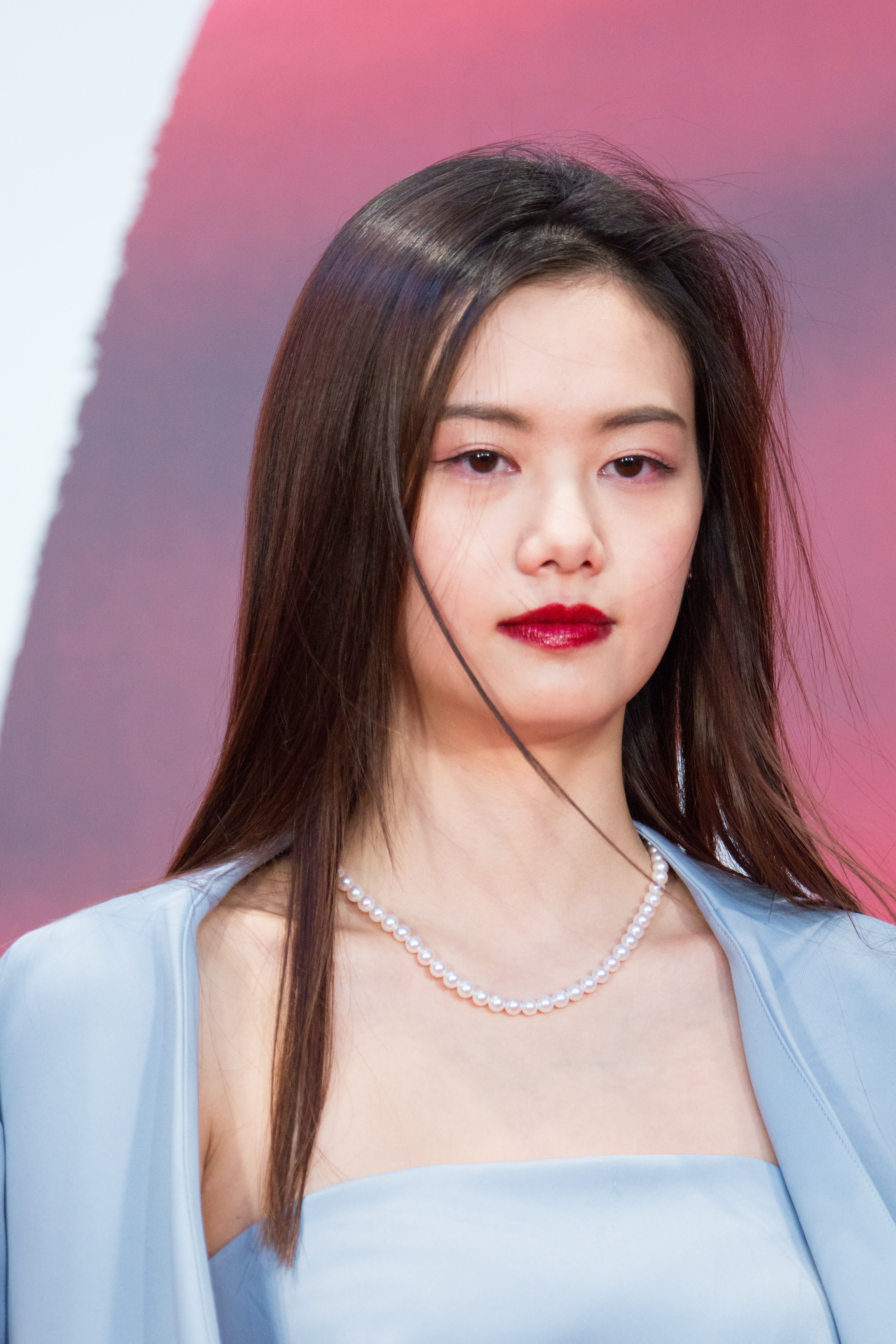 第30回 東京国際映画祭 オープニングセレモニー 泉はる（『It Girls: Anytime Smokin' Cigarette』）